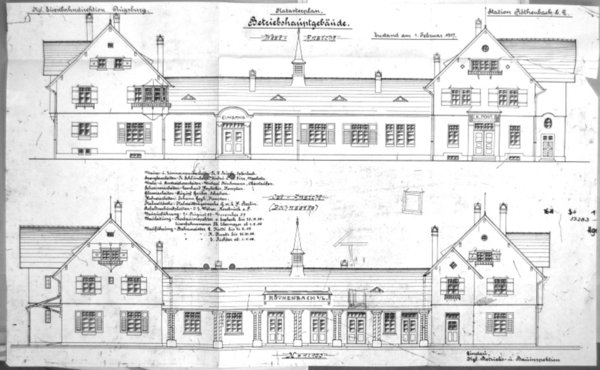 Plan Bahnhof Röthenbach (Allgäu)